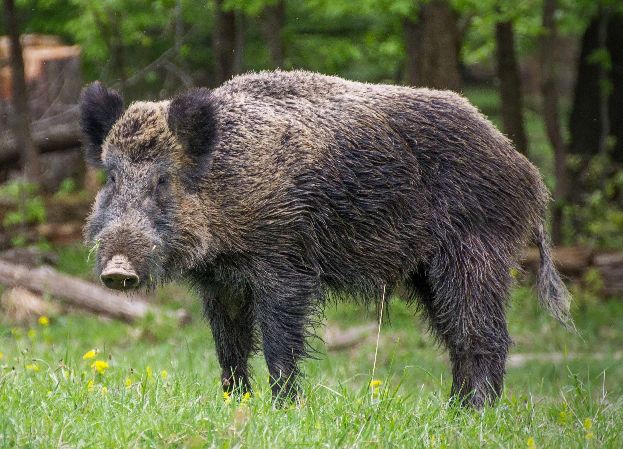 Lainzer Tiergarten